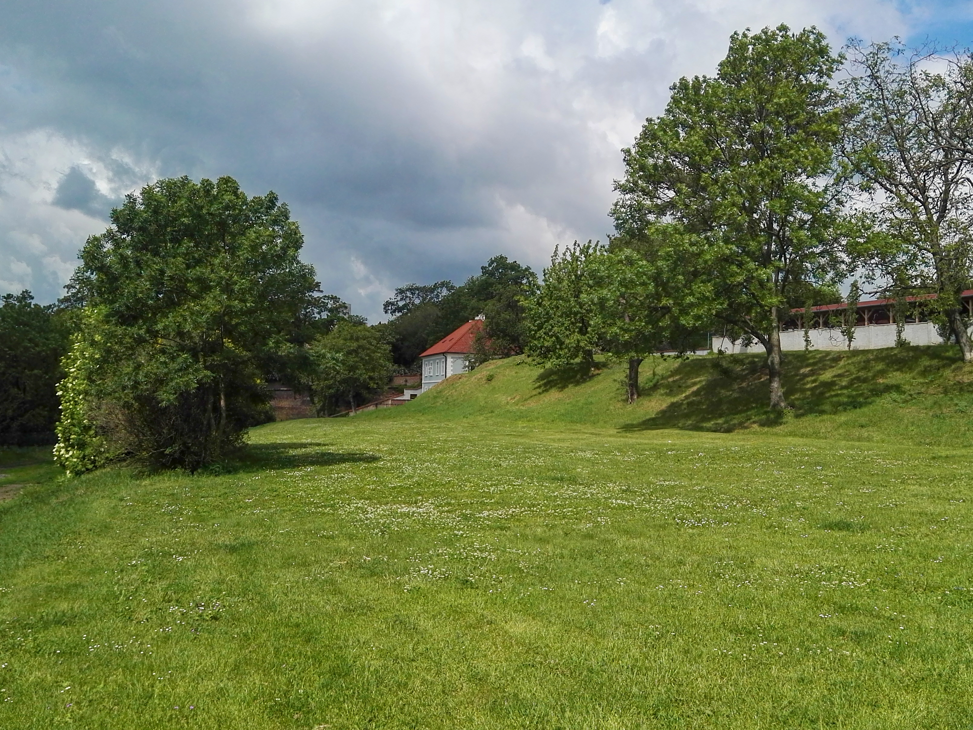 Horní Lumbeho zahrada v Praze, pohled přes zahradu k západu